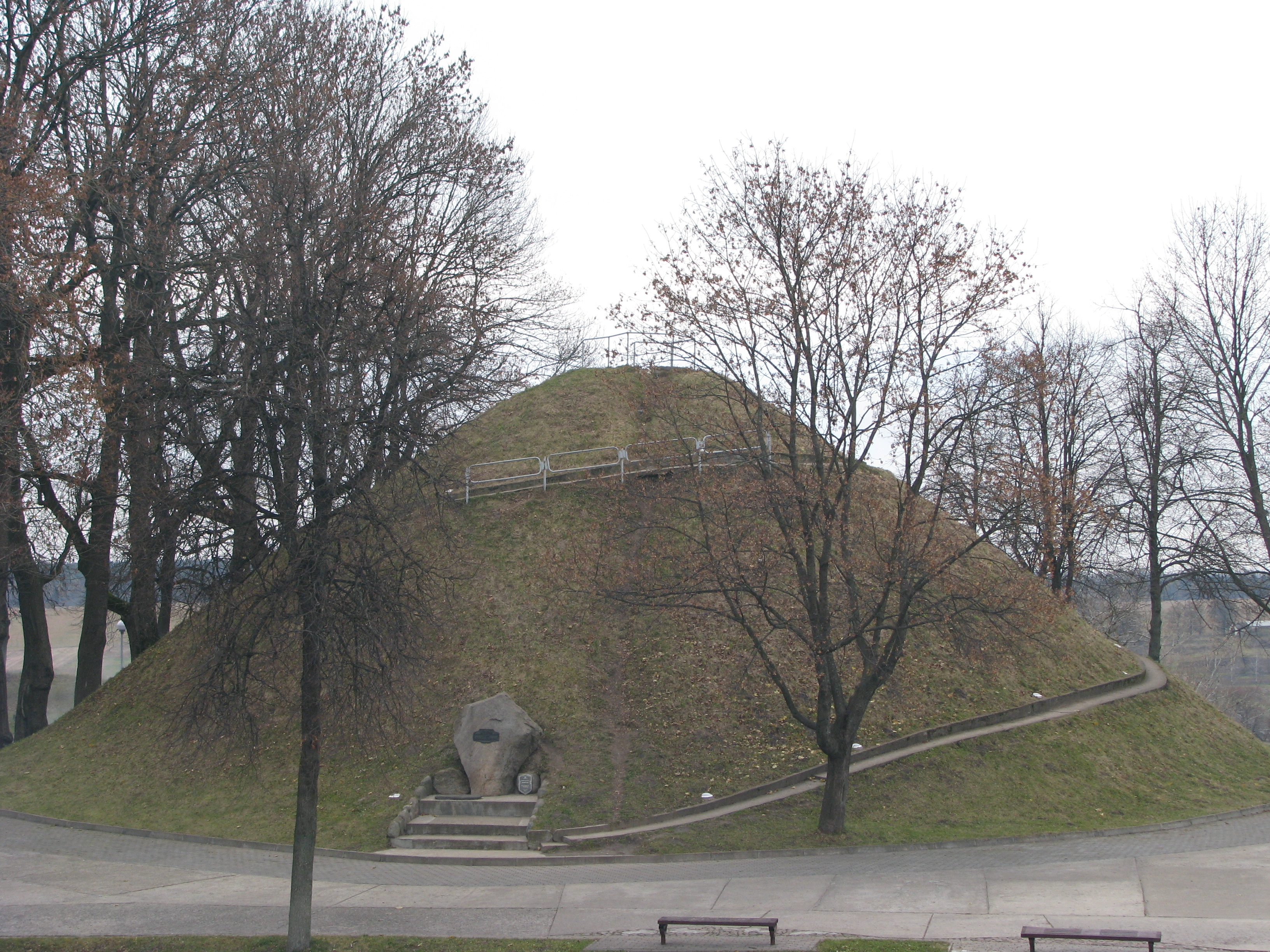 Курган Адама Мицкевича (Новогорудок, Республика Беларусь)